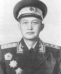 洪学智授衔照